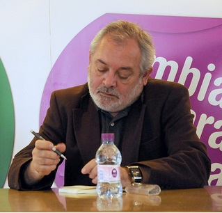 Andrés Ocaña, exalcalde de Córdoba